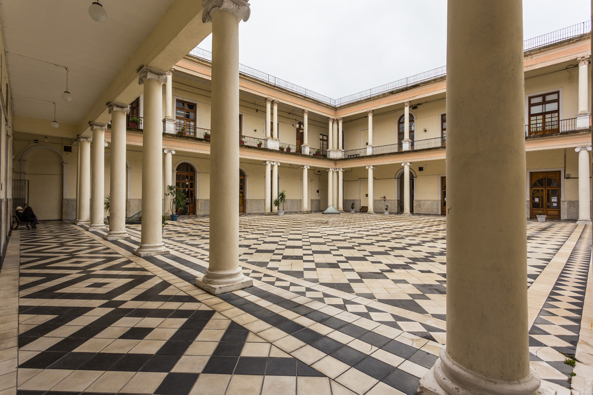 Escuela de Artes y Oficios. Ubicada en el departamento de Montevideo